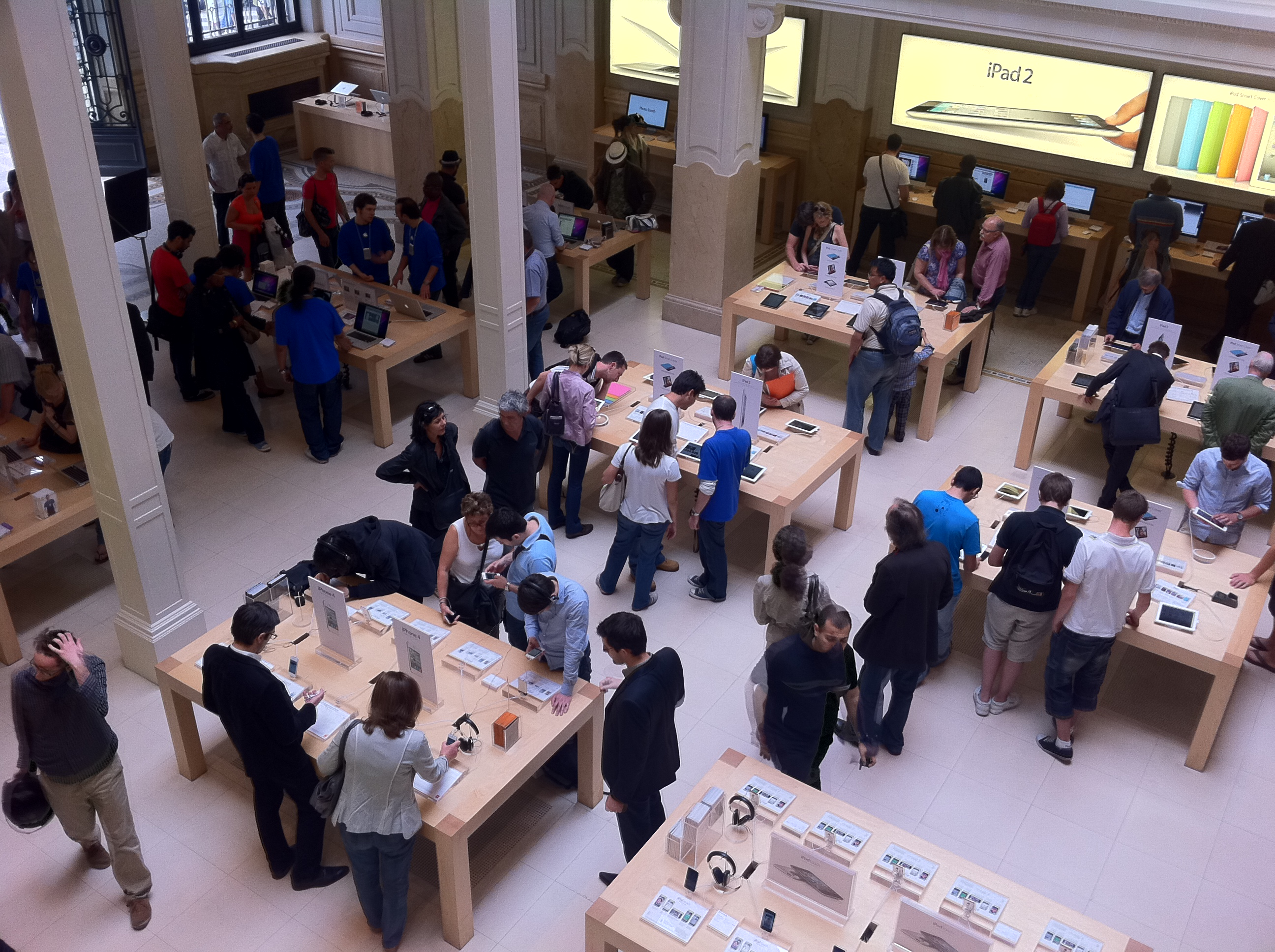 Apple Store, OpéraApple Store, Opéra